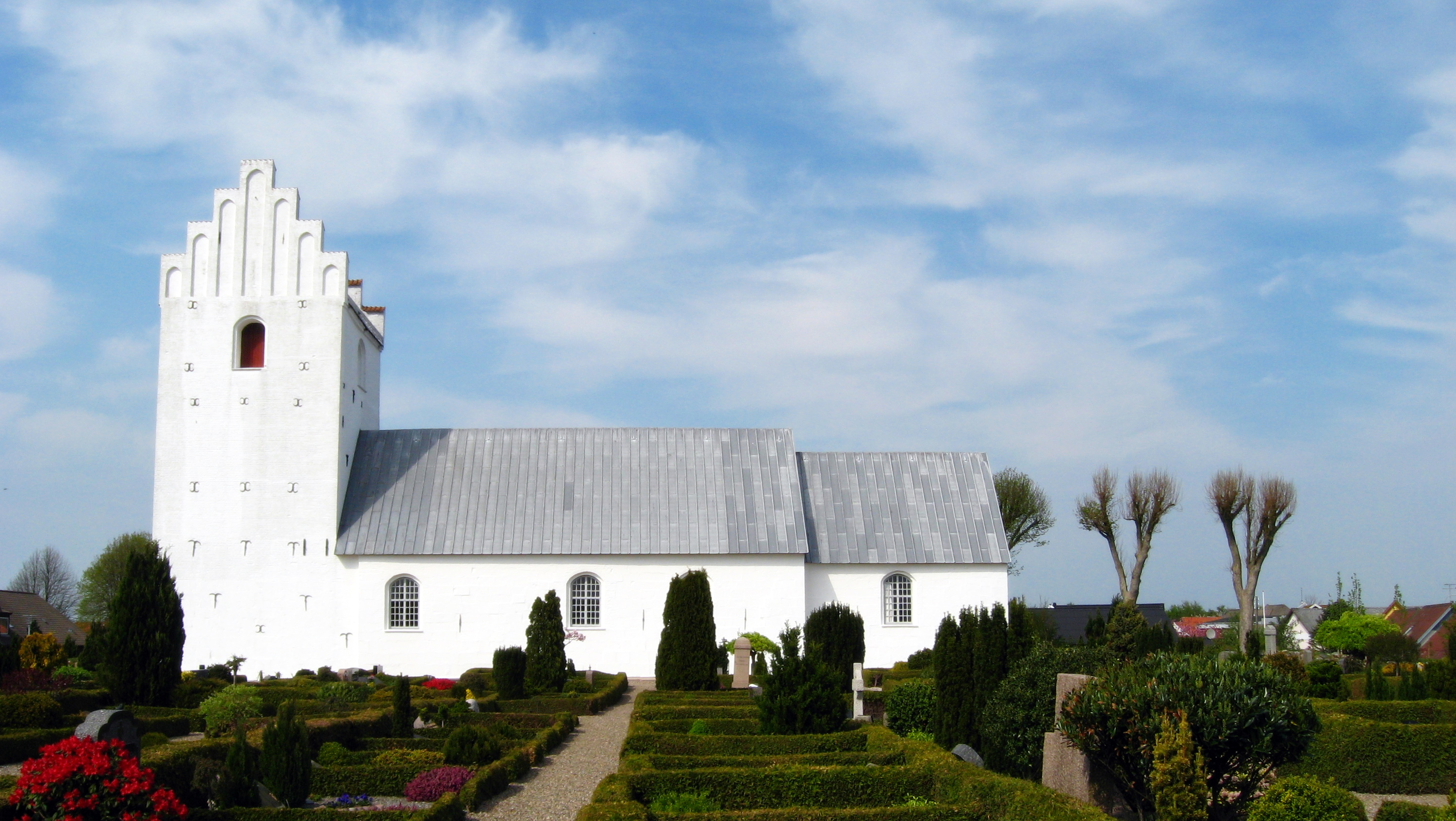 Jerslev Kirke / Brønderslev Kommune